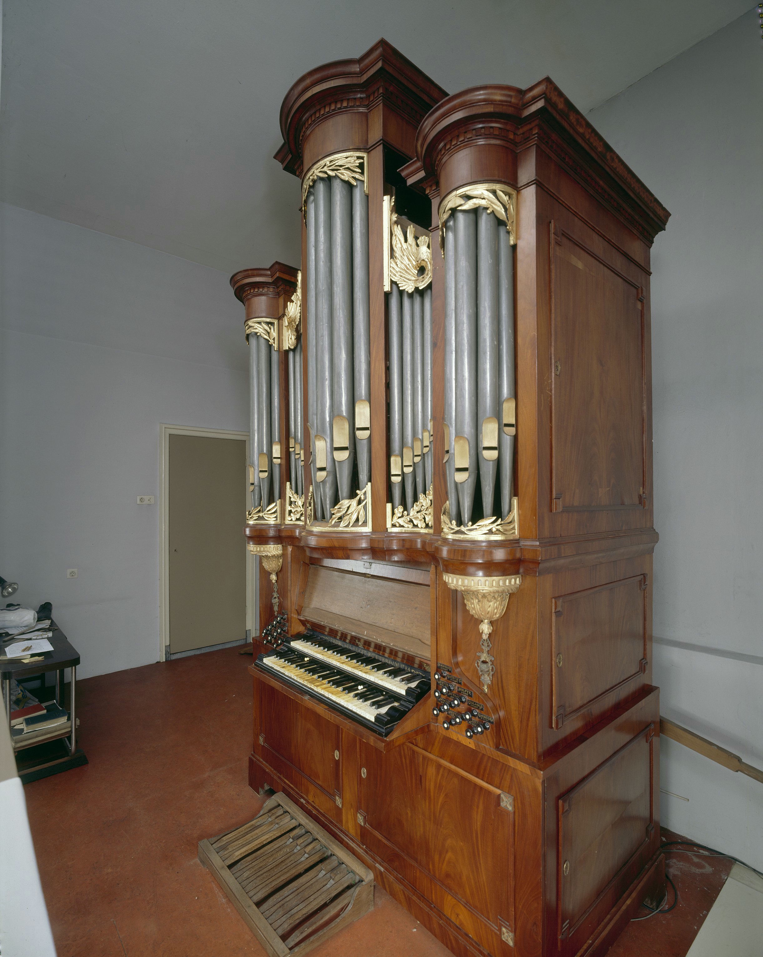 Nieuwe kapel hervormde kerk, buitengewone wijkgemeente: Interieur, aanzicht huisorgel (opmerking: Gefotografeerd voor Het Historische Orgel in Nederland 1769-1790)